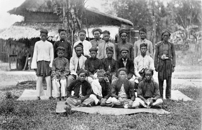 Foto. Deze foto is gemaakt tijdens de Sumatra Expeditie van 1877-1879. Inlandsche typen uit de afdeeling Rawas.. Boedjangs of ongehuwde jongens van Lesoeng Batoe, district Rawas, Sumatra